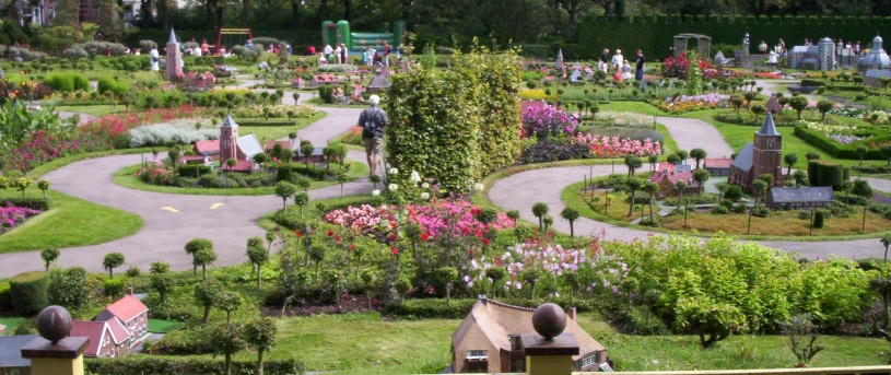 Overzicht van het park Miniatuur_Walcheren